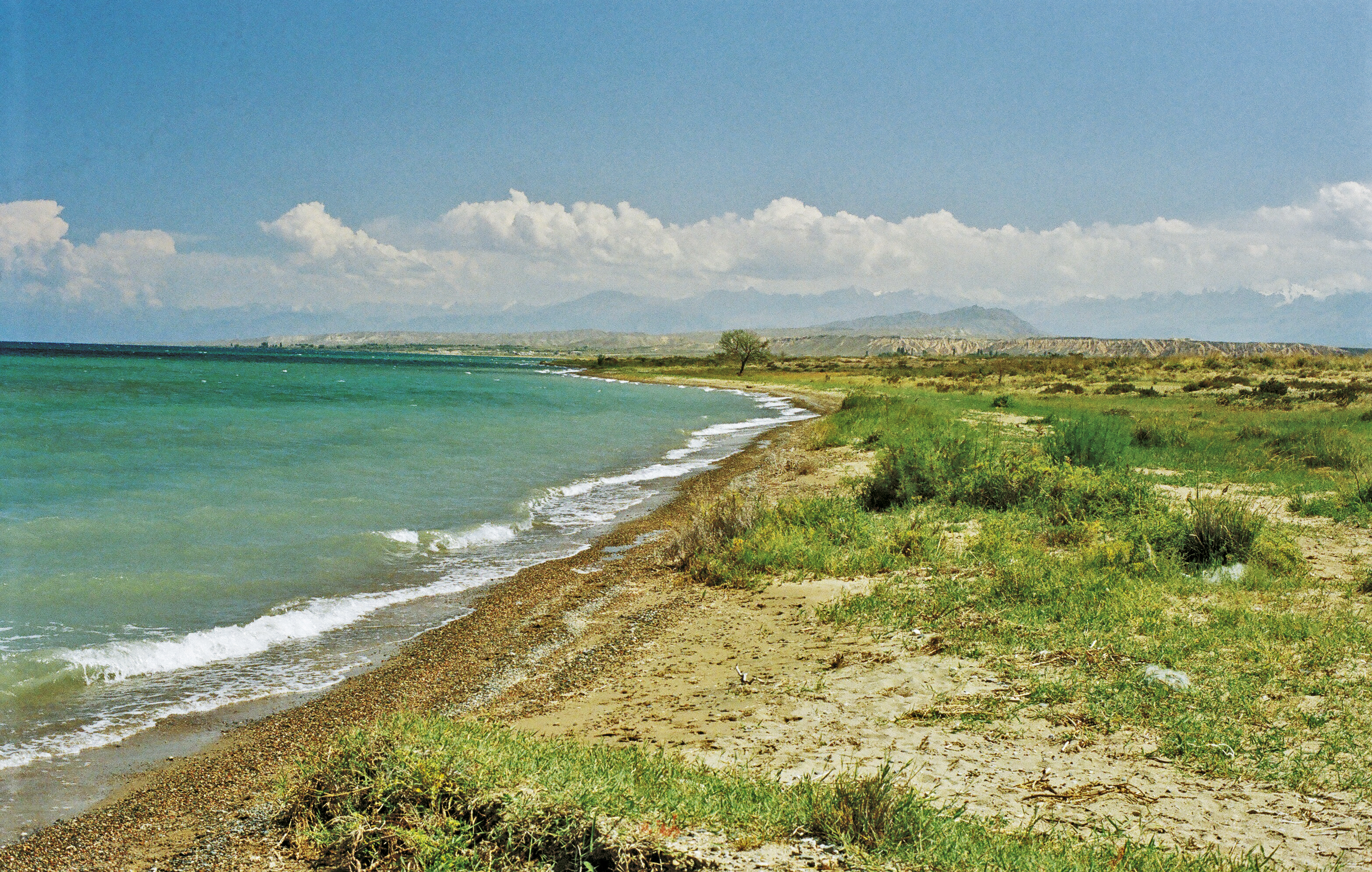 Озеро Иссык-куль, Киргизия 2006. Из коллекции экологической организации «Родники Белогорья».